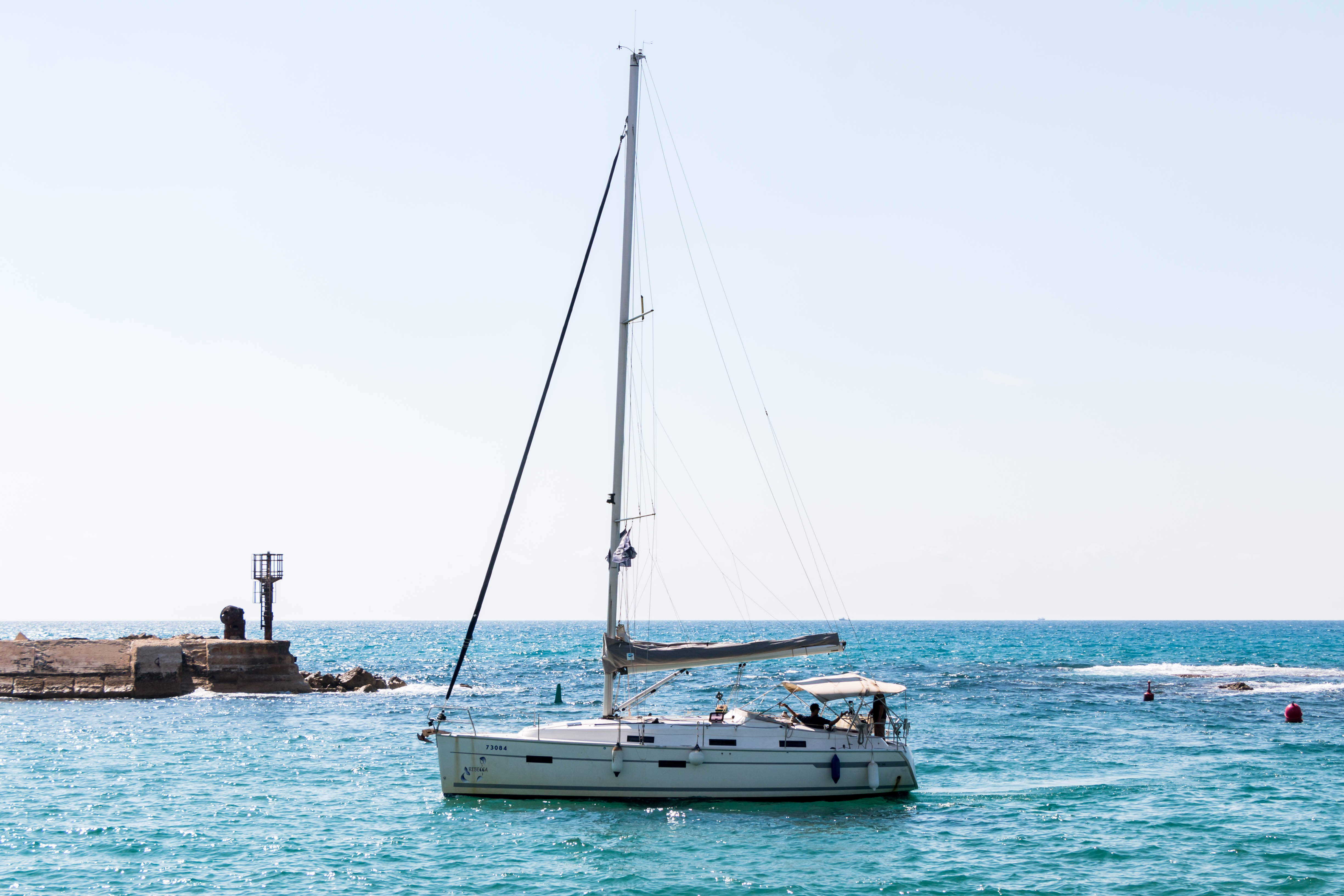 "REBECCA"